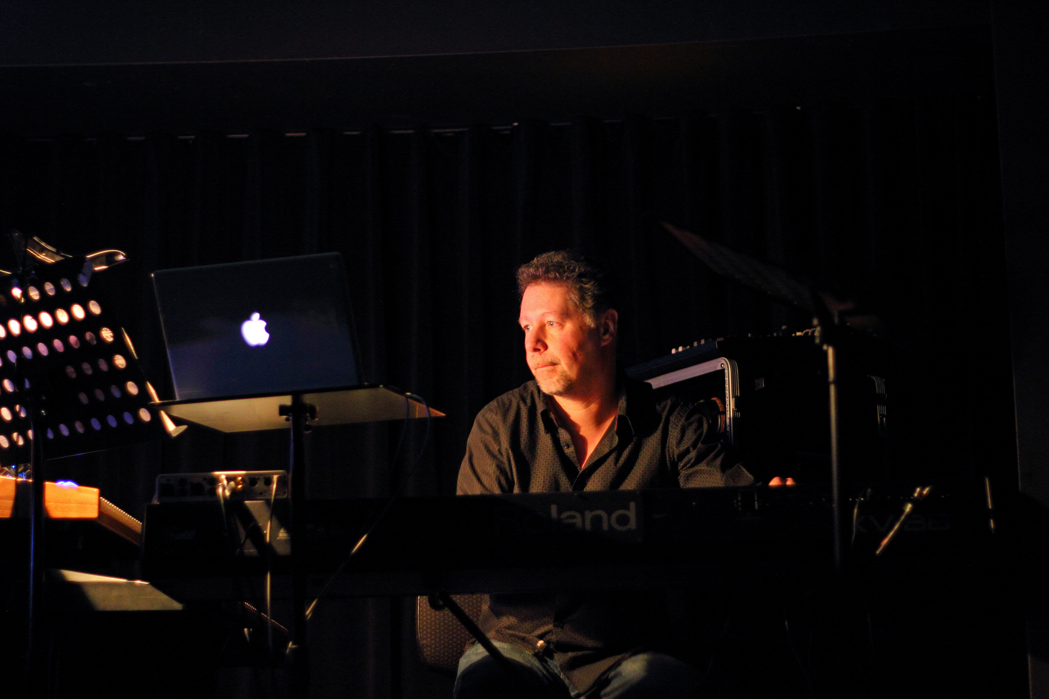 Verleihung des Schallwelle-Musikpreises am 10. März 2012. Kuppel des Planetariums Bochum. Konzert von Frank van Bogaert.